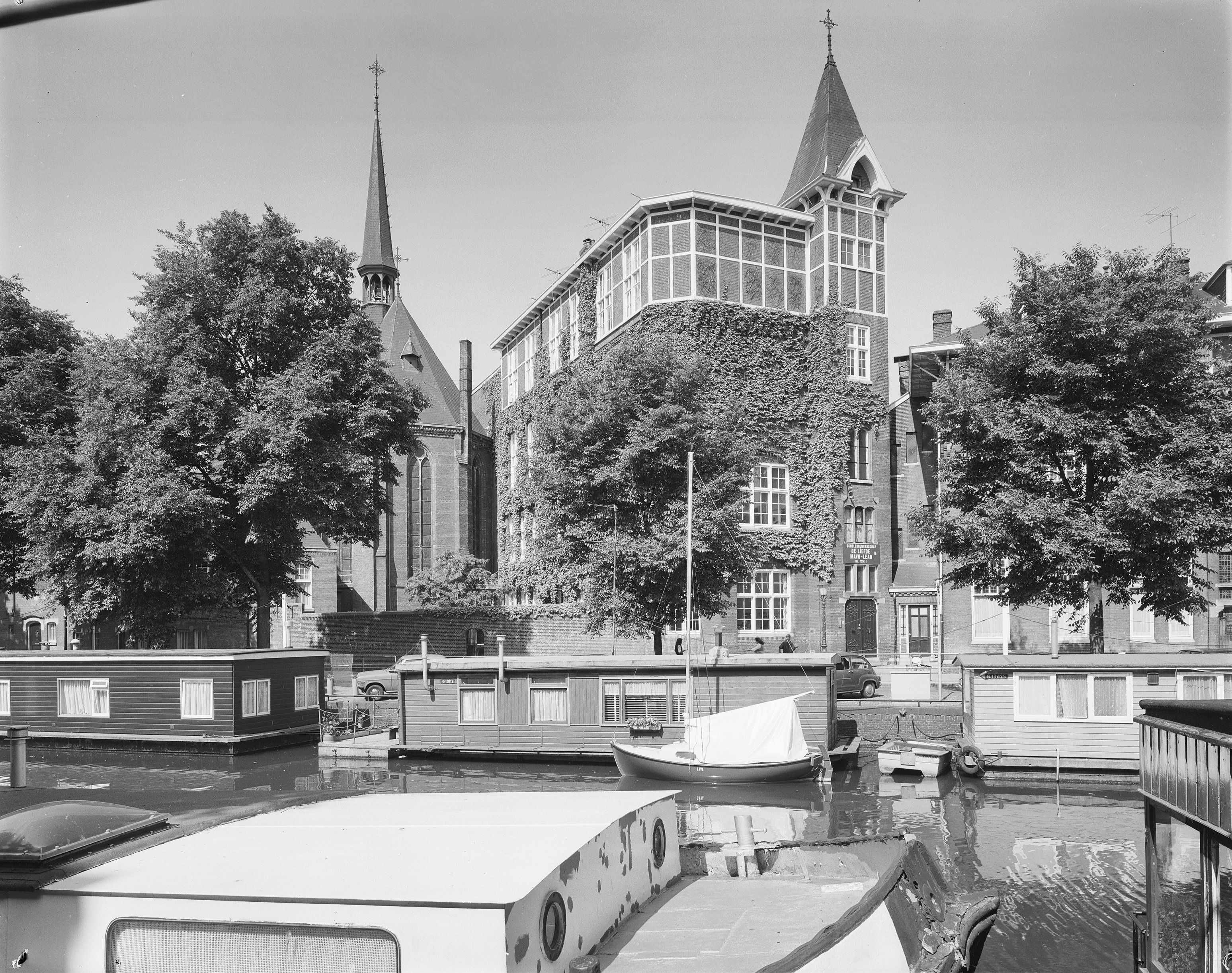 R.K.Kerk "De Liefde"/ St.Nicolaas- en Barbarakerk: overzicht (Da Costakade)